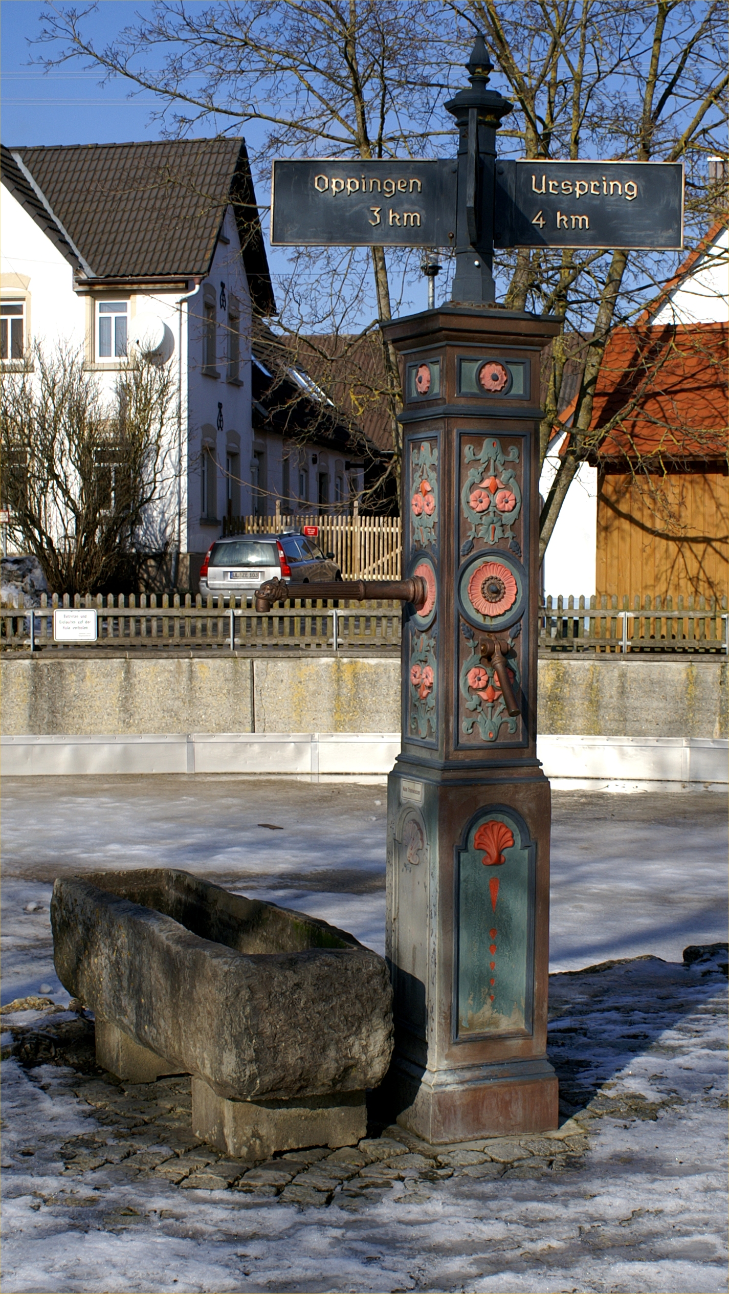 Historischer Wegweiser in Radelstetten im Alb-Donau-Kreis